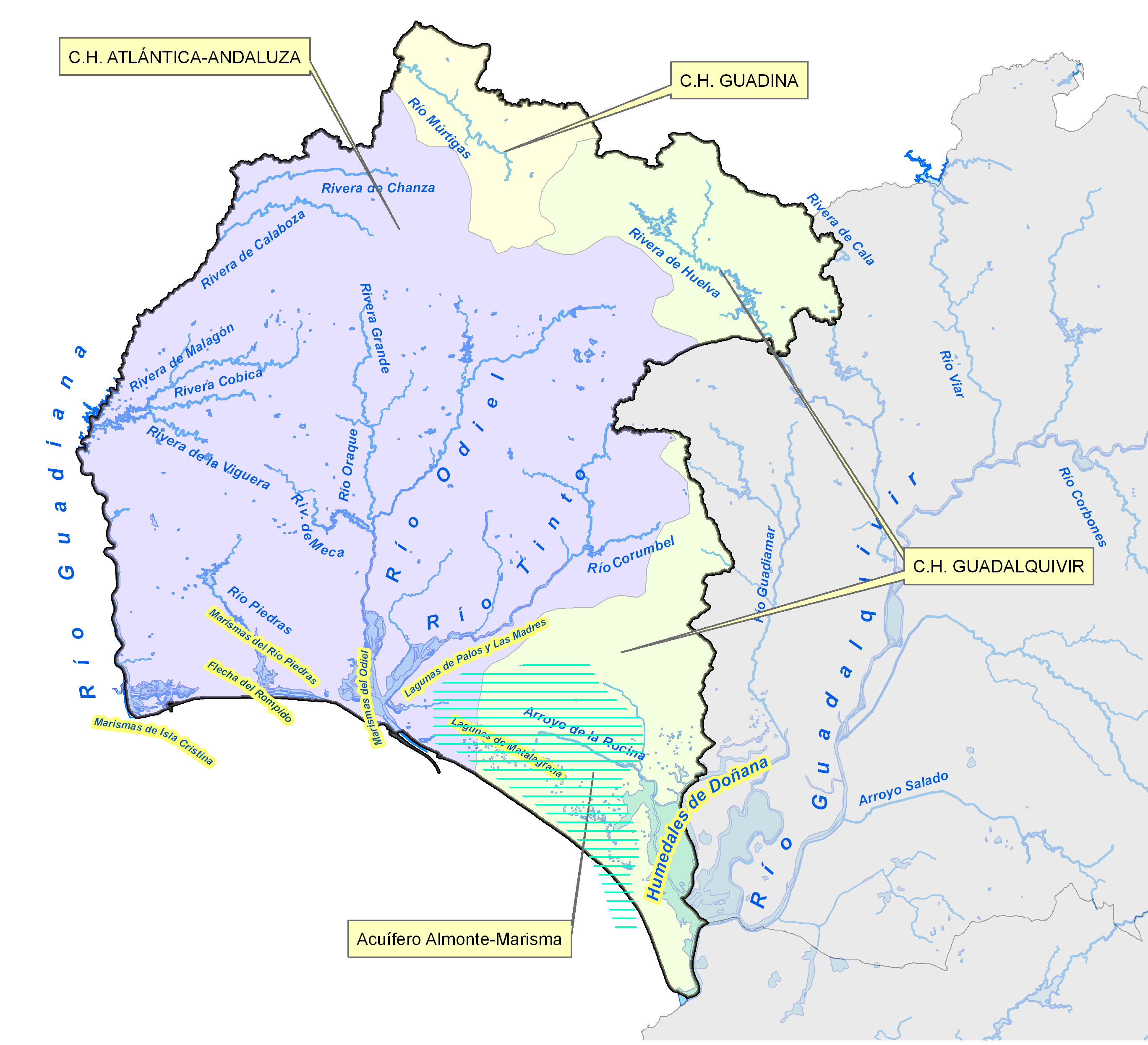 Hidrogeografía de Huelva